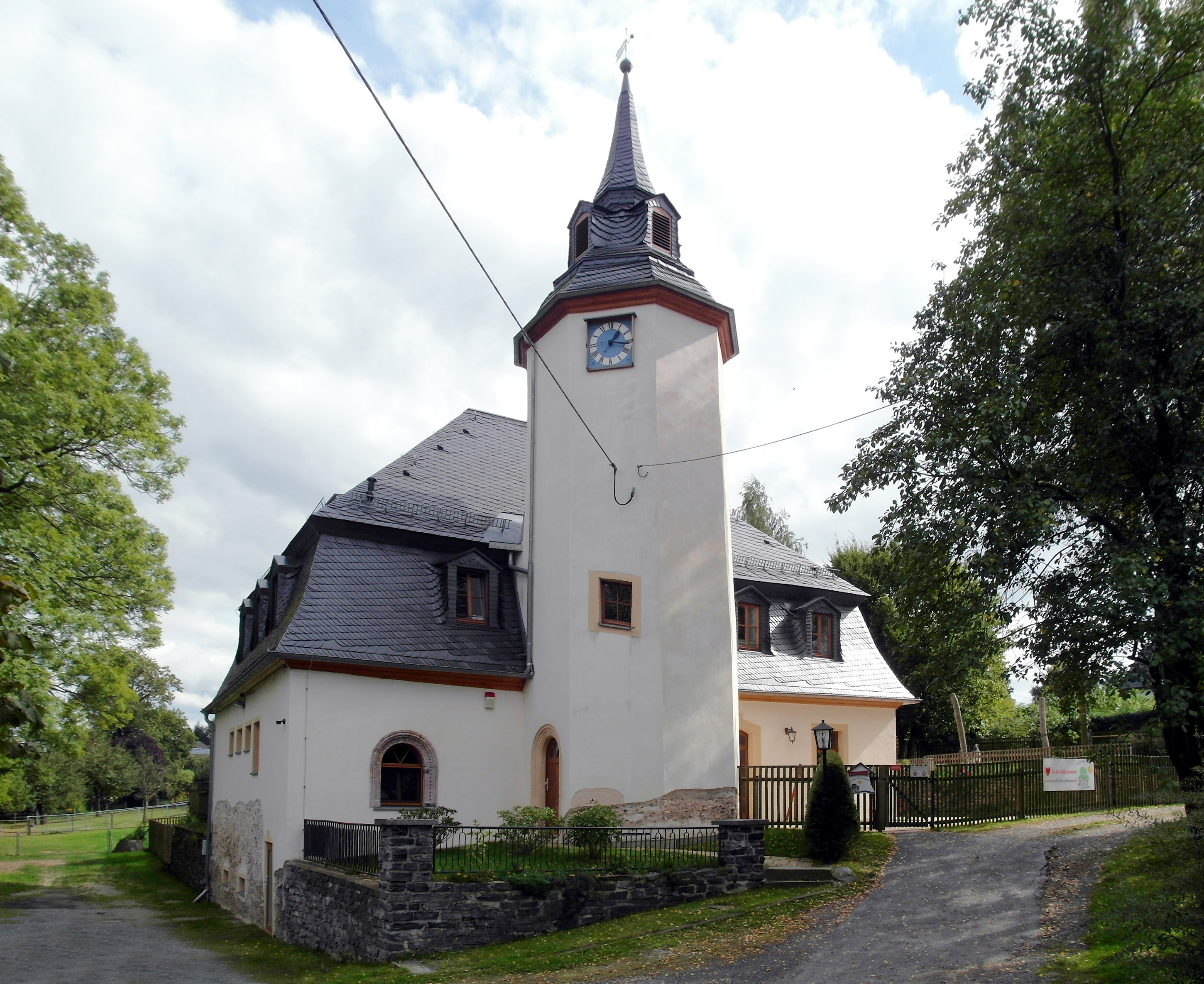 24.09.2015 09439 Schlößchen (zu Porschendorf zu Amtsberg): Teichweg 3 / Am Rittergut (GMP: 50.744509,13.038884): Rittergut Porschendorf. Turmhaus Rittergut Schlößchen. Heute Verein - Generationenhaus Lebensbaum e.V. [SAM1796.JPG]20150924515DR.JPG(c)Blobelt